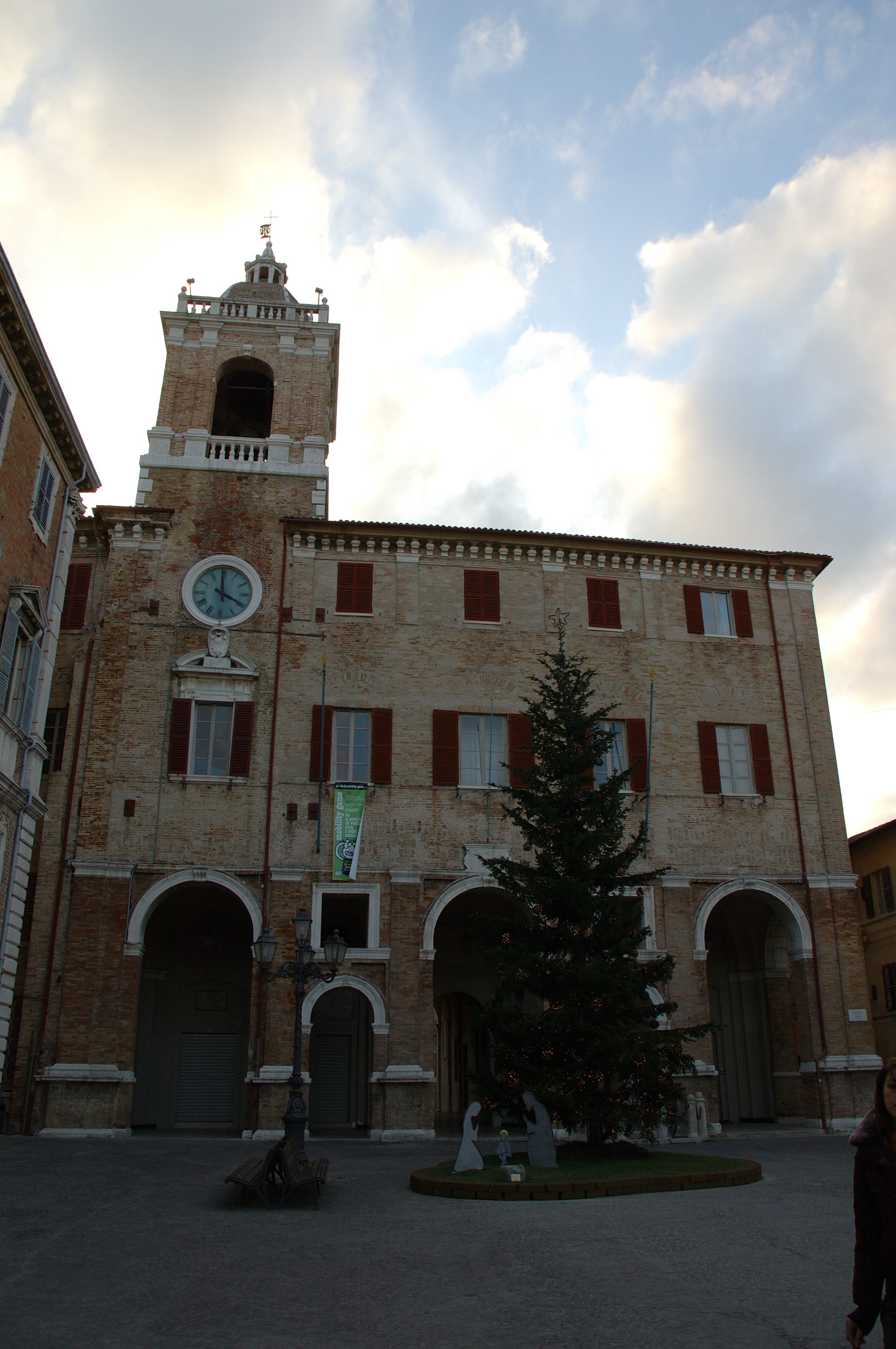 Senigallia è una città nelle Marche, Italia.